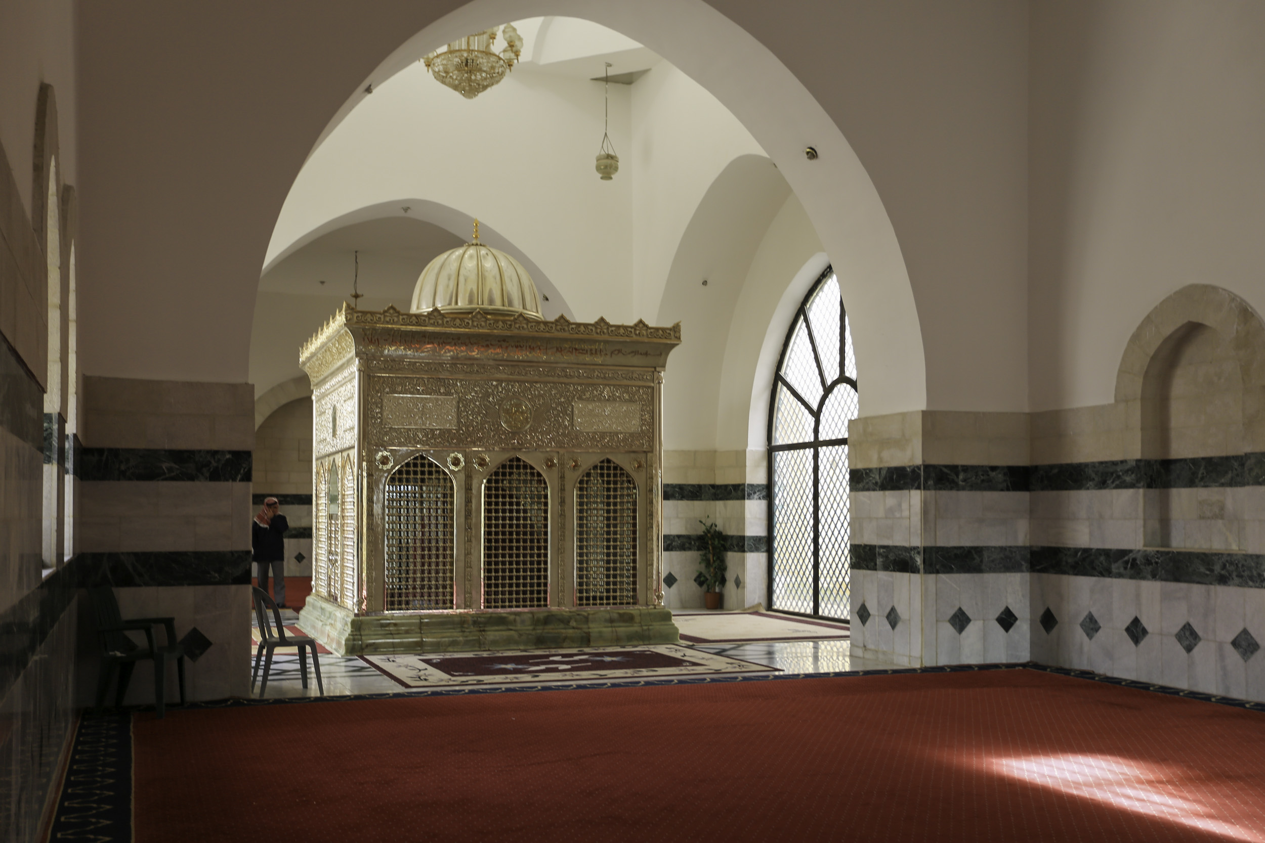 Al-Mazār al-Janūbī (Jaʿfar ibn Abī Ṭālib Shrine)